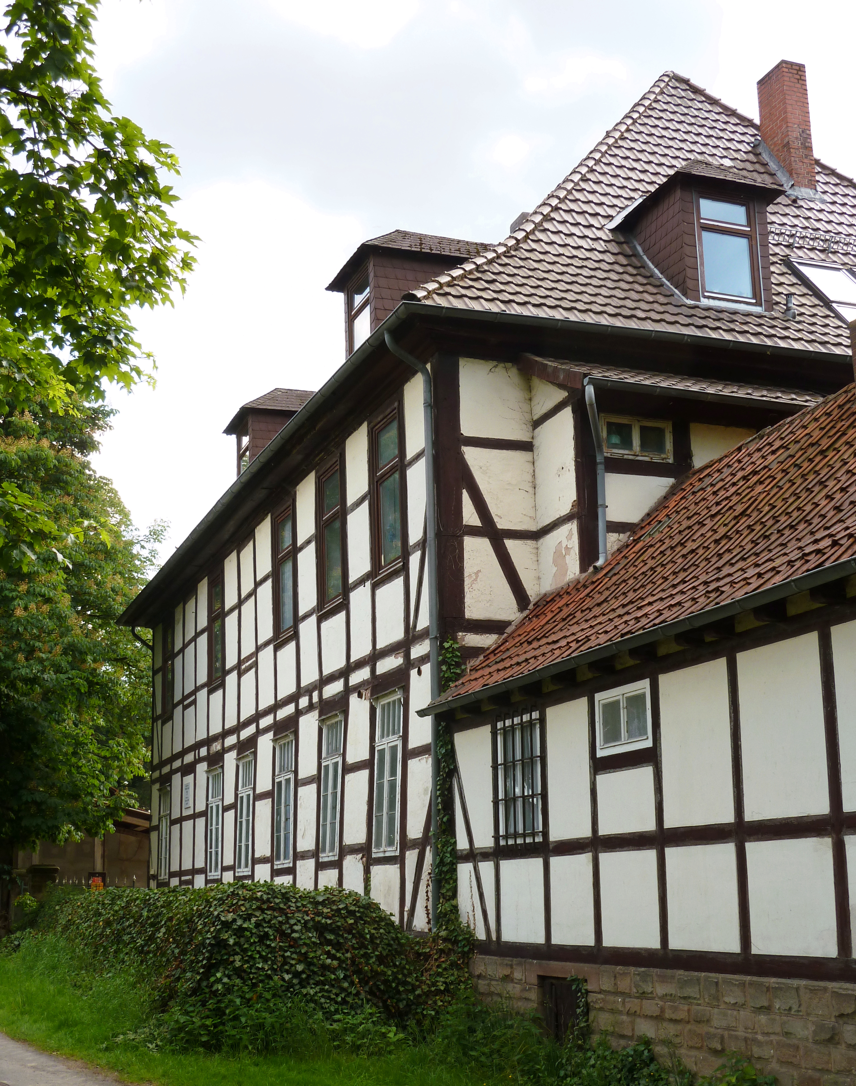 Neues Amtshaus auf der Domäne Niedeck, Gemeinde Gleichen, Südniedersachsen. Erbaut 1751, Wohnhaus des Justizamtmanns Leonhardt und seiner Töchter Dorette und Auguste "Molly", Ehefrau und Geliebte Gottfried August Bürgers, der 1774/75 ebenfalls hier gewohnt haben soll.